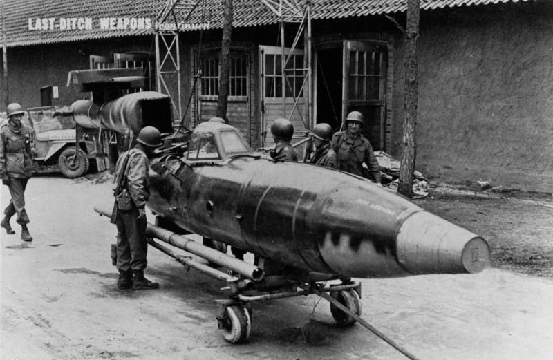 Neu Tramm, US-Soldaten mit V1 Last ditch weapons continued [Neu Tramm.- Amerikanische Soldaten mit erbeuteter pilotengesteuerter Bombe V-1 "Reichenberg-Gerät", ca. April 1945]